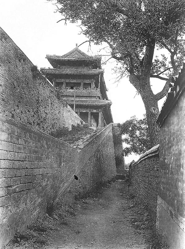 北京西直门城楼。